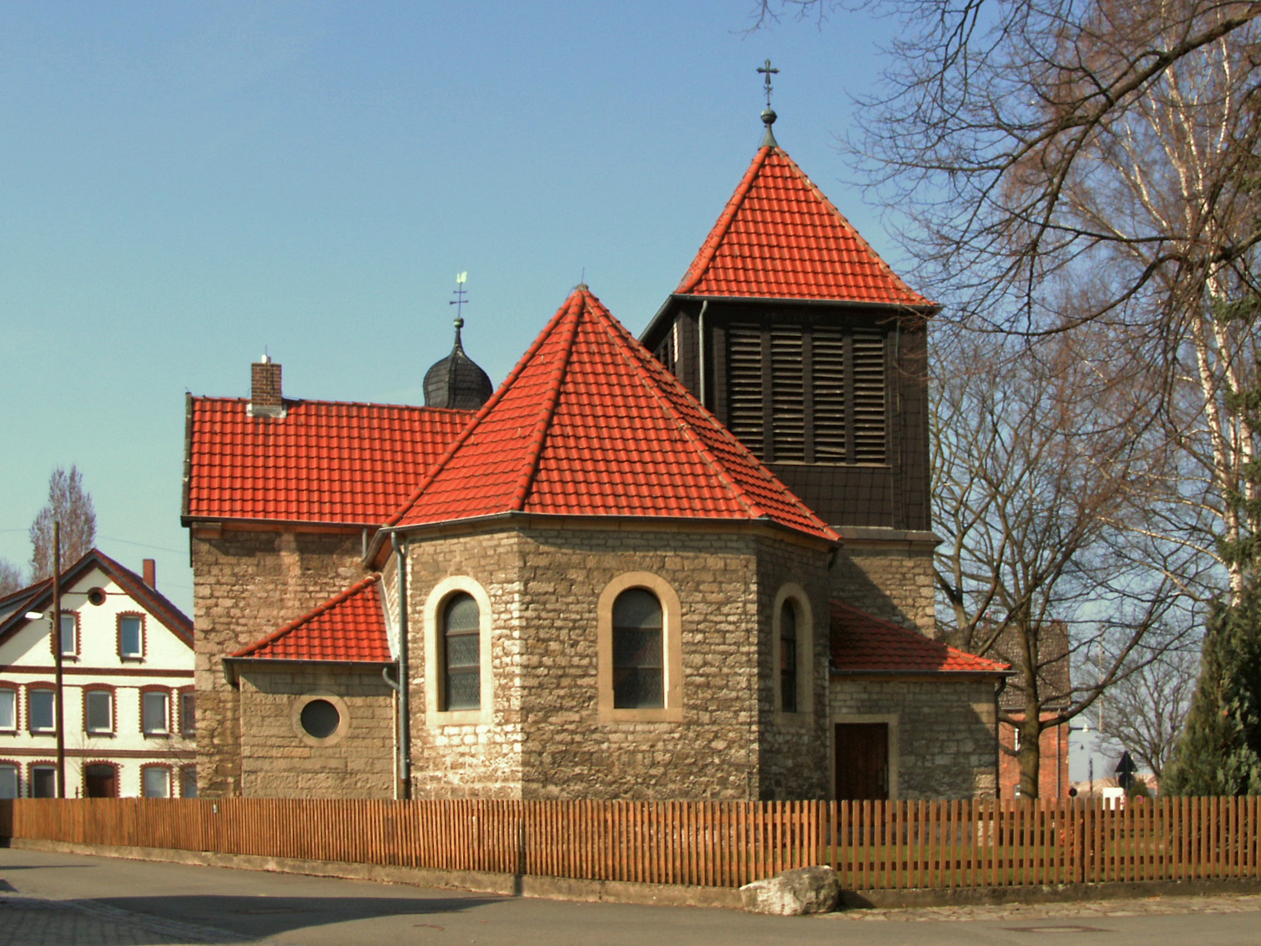 Katholische Kirche St. Nikolaus in Hildesheim-Drispenstedt (Pastor Vollmar Stiftung)